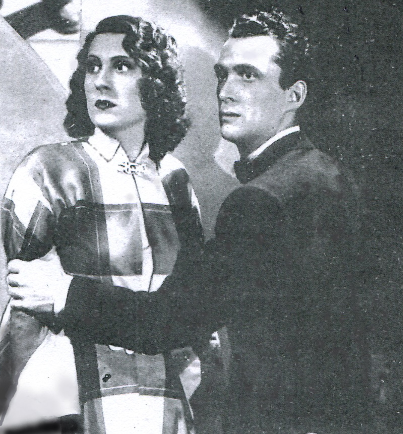 Carla Candiani ed Maurizio D'Ancora in una scena de "L'albergo degli assenti" (Matarazzo, 1938)